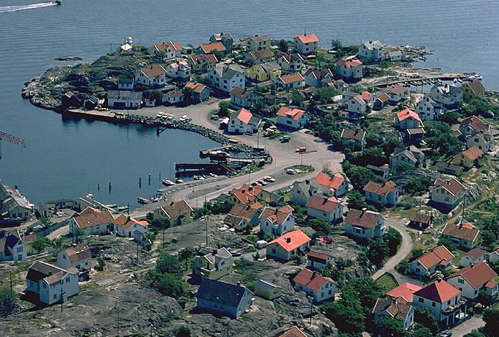 Hamnen med "Björnhuvudet" och "Stranden". Bilden troligen från slutet av 1970-talet. Motiv: Öckerö Nyckelord: Flygbilder Kategori: Skärgårdsby Hamnen med "Björnhuvudet" och "Stranden". Bilden troligen från slutet av 1970-talet.